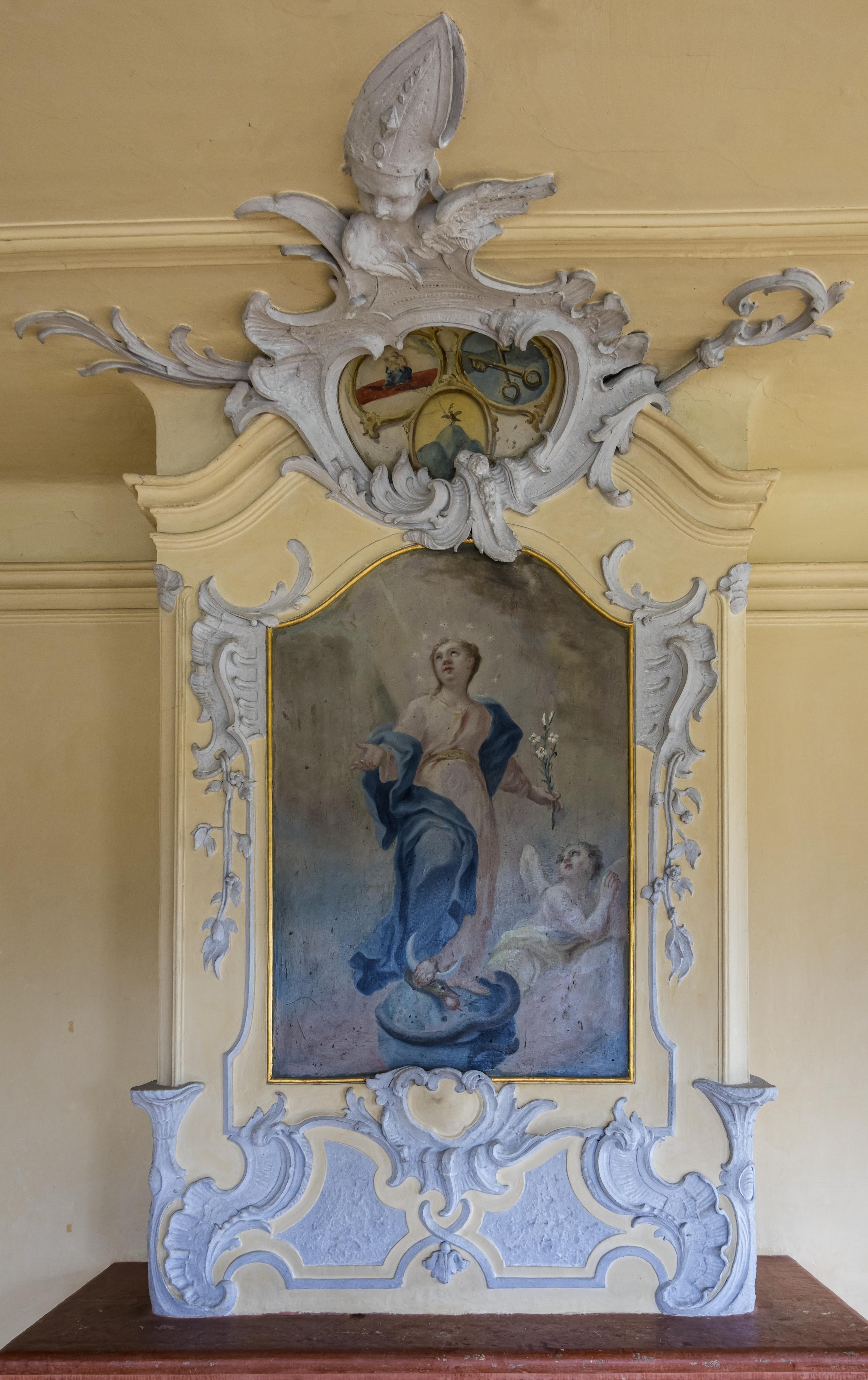 Die katholische Kirche in Wyhl und das zugehörige Pfarrgebäude. Das Gemälde über dem Kamin mit der Stuckarbeit